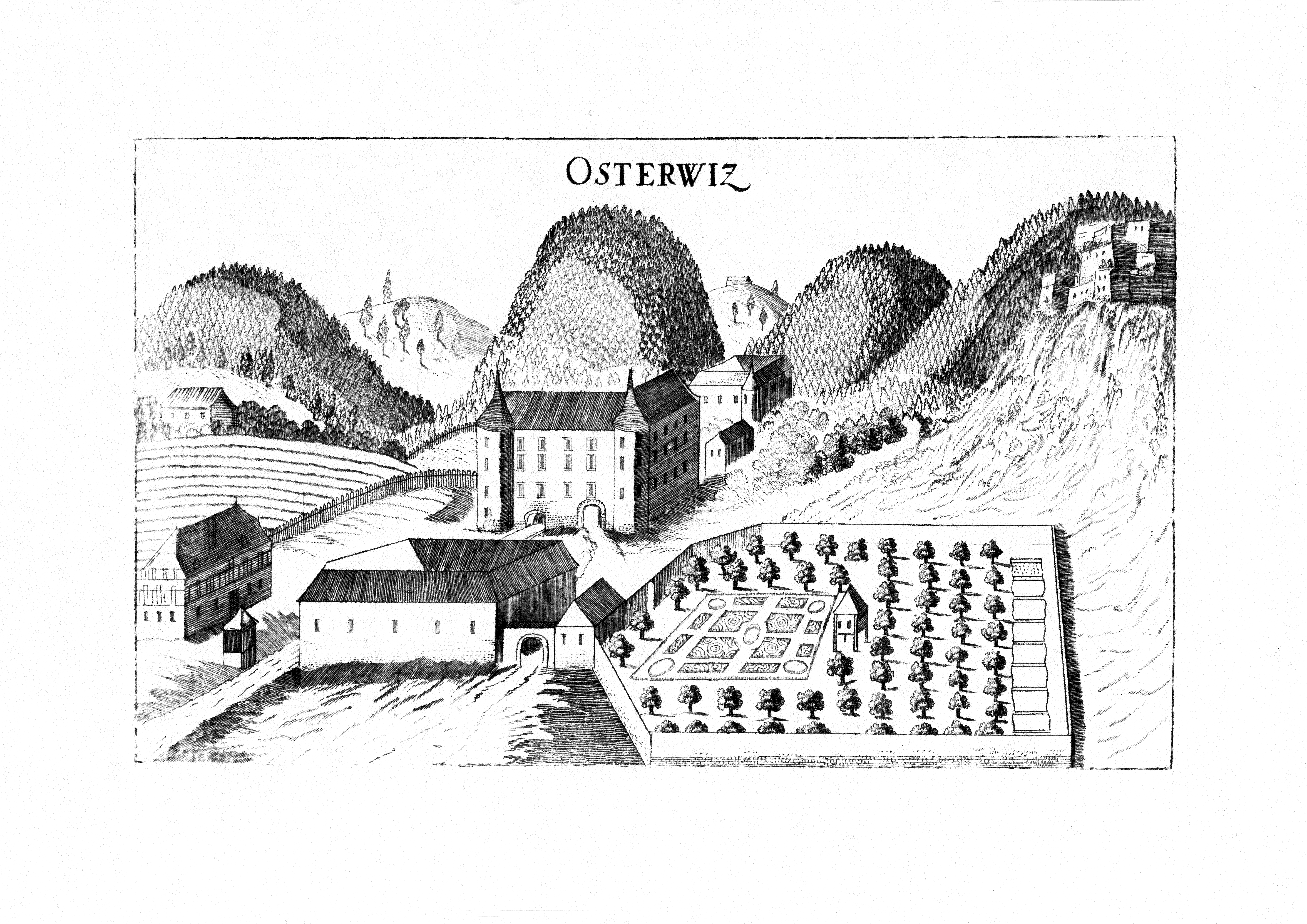 Georg Matthäus Vischer, Topographia Ducatus Stiriae: Schloss und Ruine von Osterwitz im Sanntal, Ojstrica, Gemeinde Tabor, Slowenien, Mitte 17. Jahrhundert